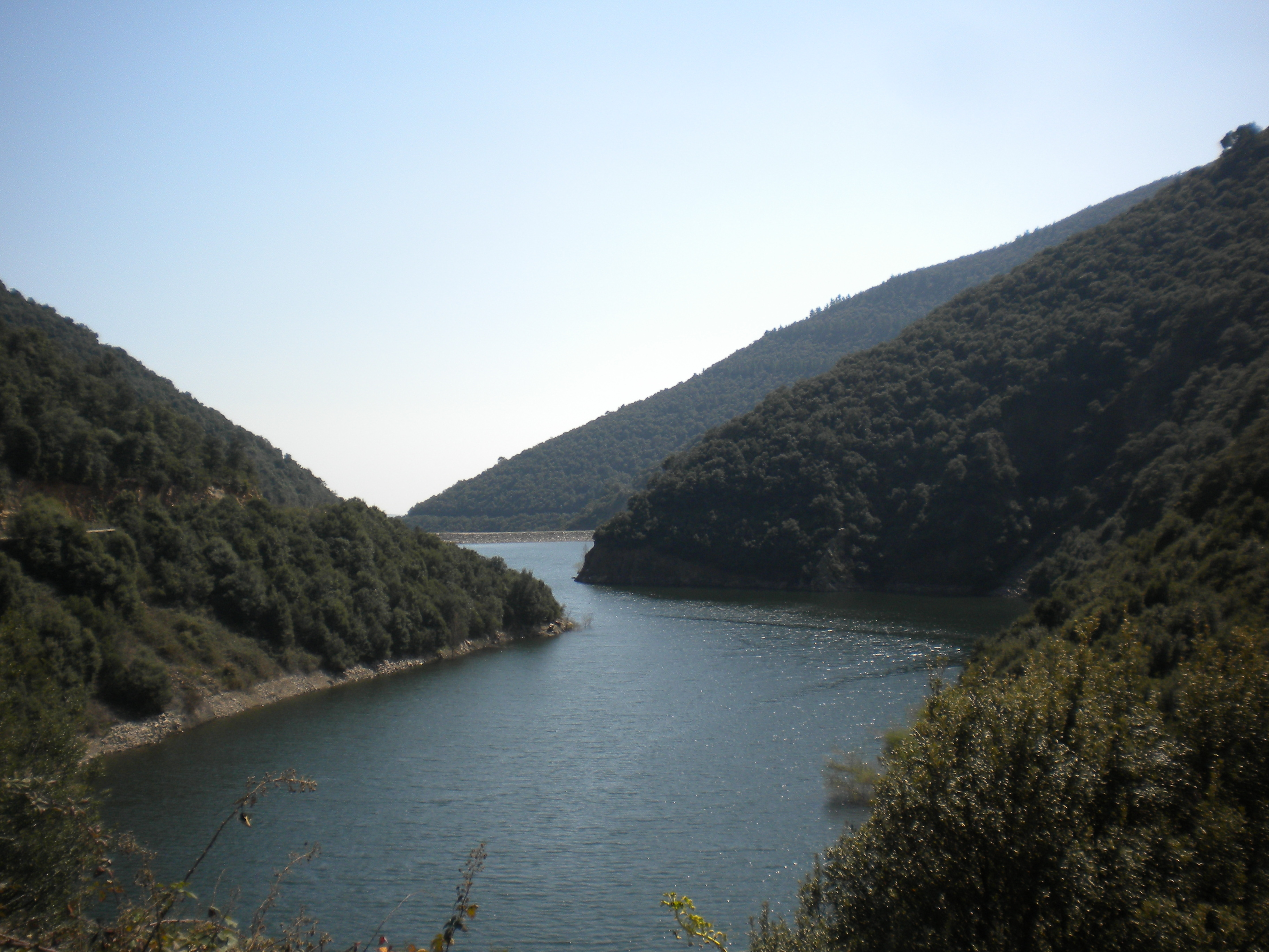 Pantà de Vallfornès, al municipi de Cànoves i Samalús